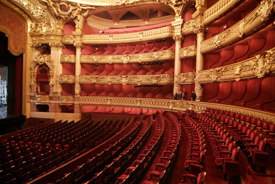 Balcony and side of the Garnier Opera House, Paris / Balcon et loges de côté de l’opéra Garnier, à Paris